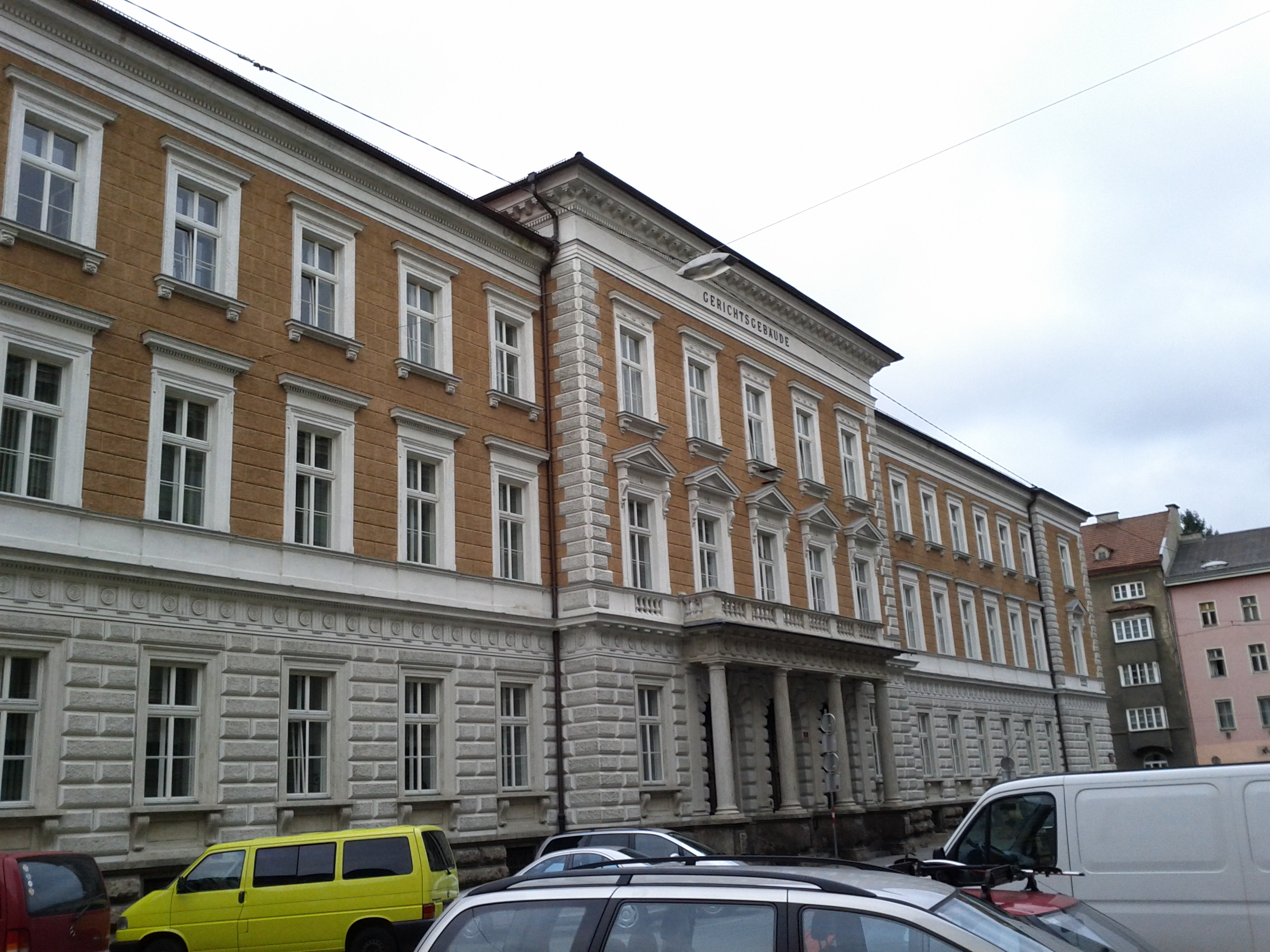 Altes Landesgericht: Schmerlingstraße 1 in Innsbruck